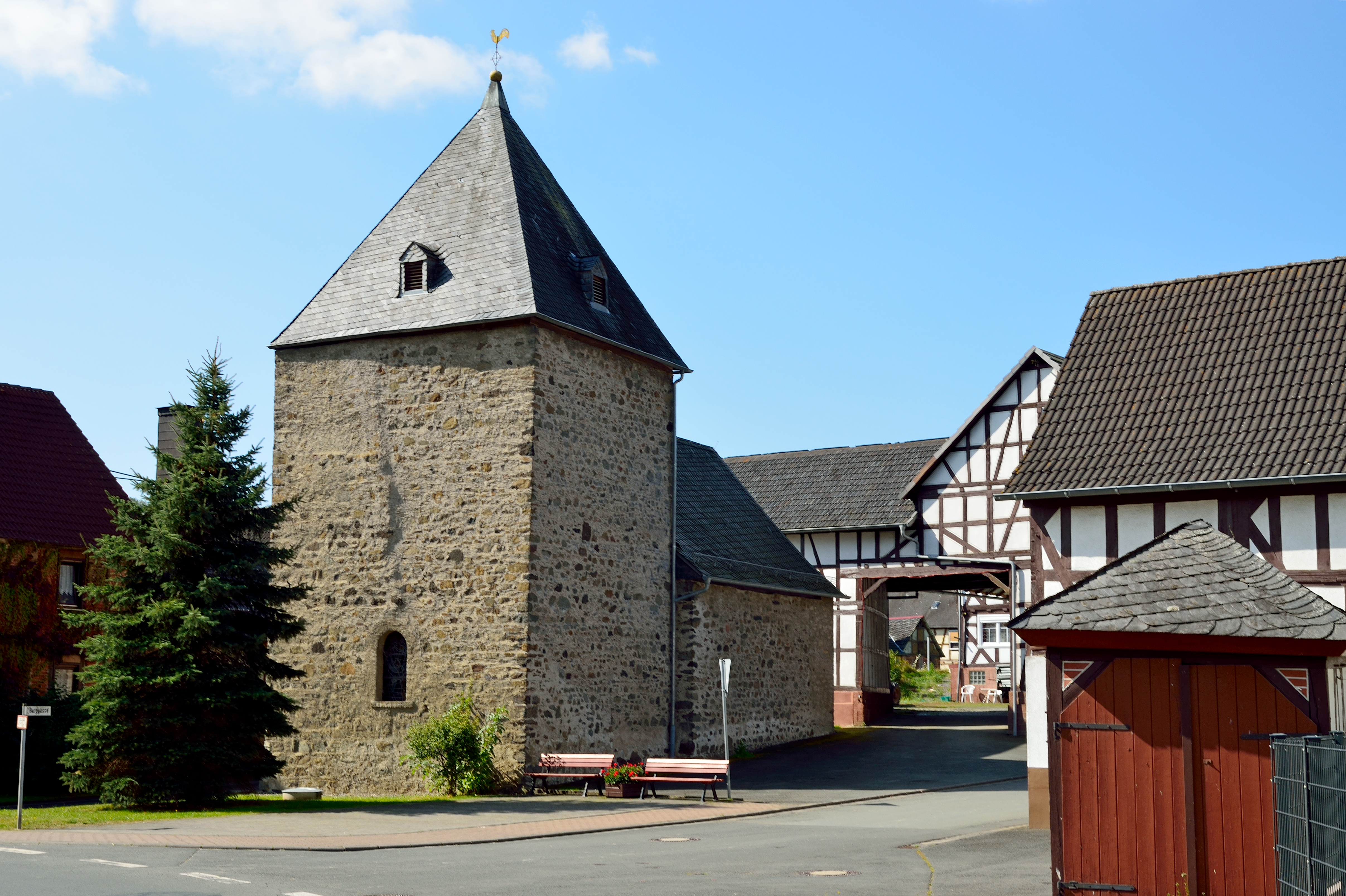 Die ev. Kapelle/Chorturmkirche in Sinkershausen